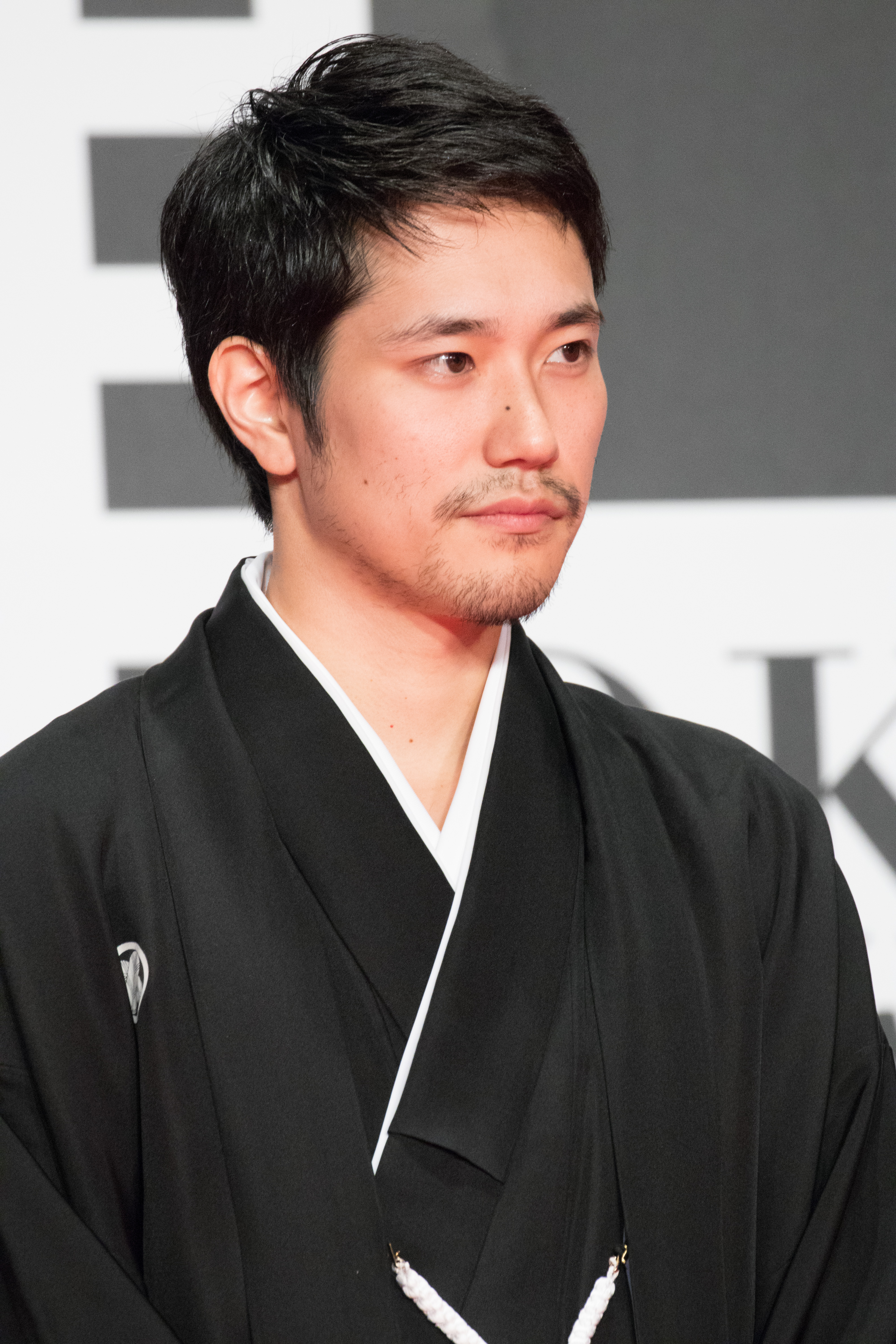 第29回 東京国際映画祭 オープニングセレモニー 松山ケンイチ (聖の青春)